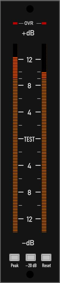 Peak Programme Meter, EBU-Scale (IEC 268-10 IIb)